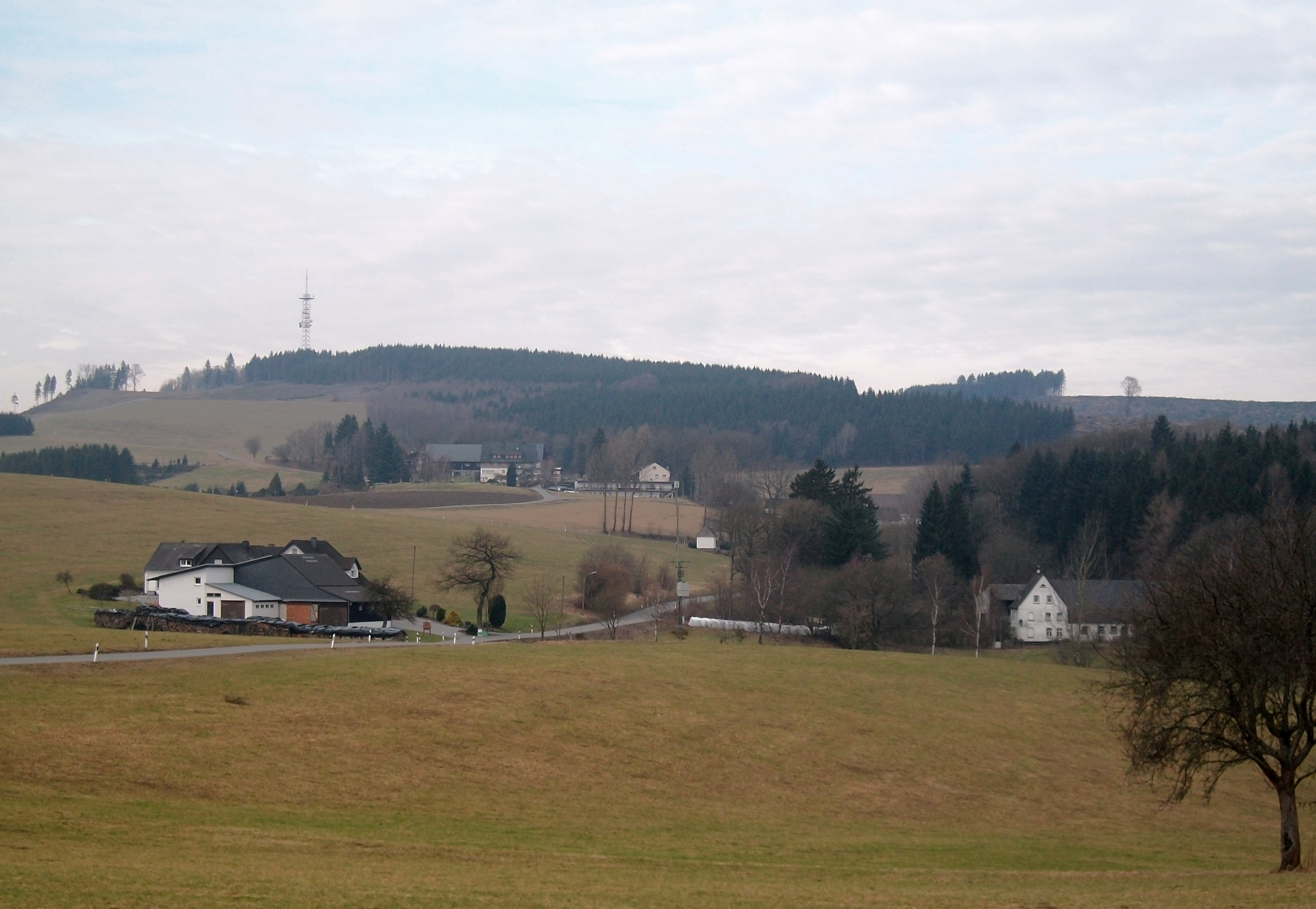 Oesterberge Gemeinde Eslohe (Germany), mit Landschaftsschutzgebiet Grünlandkomplex um Oesterberge (Grünland ums Dorf und Landschaftsschutzgebiet Eslohe (Wald).